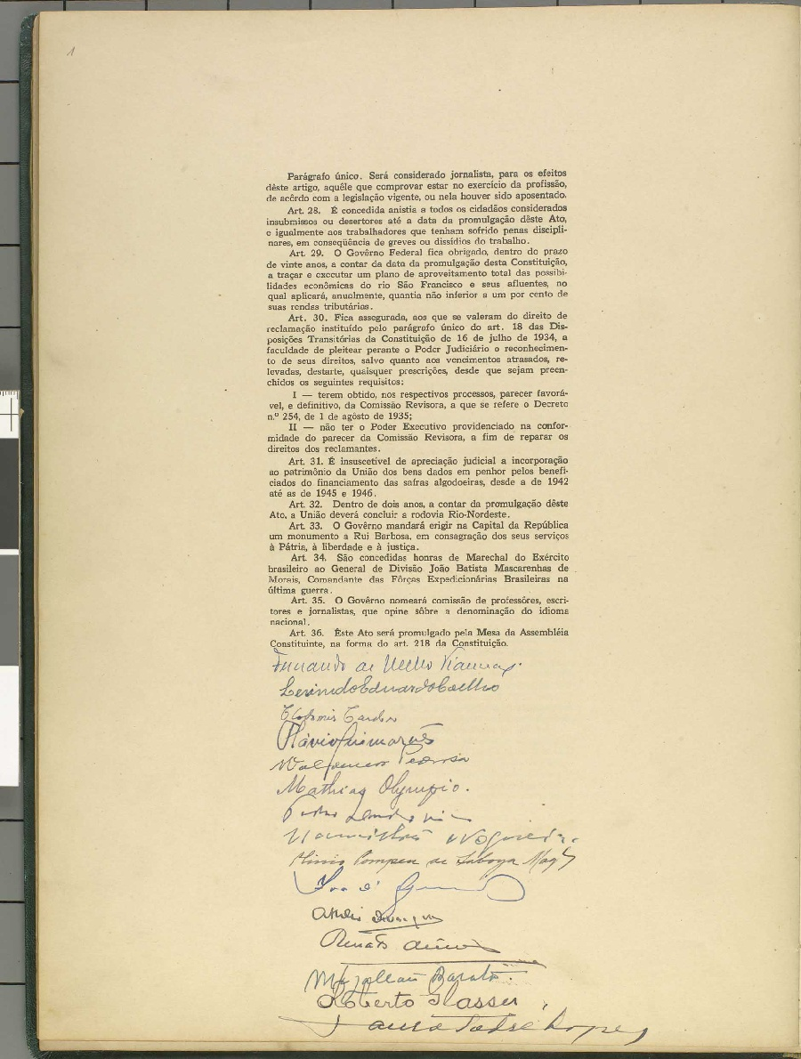 Página 41 da Constituição da República do Brasil, de 1946.